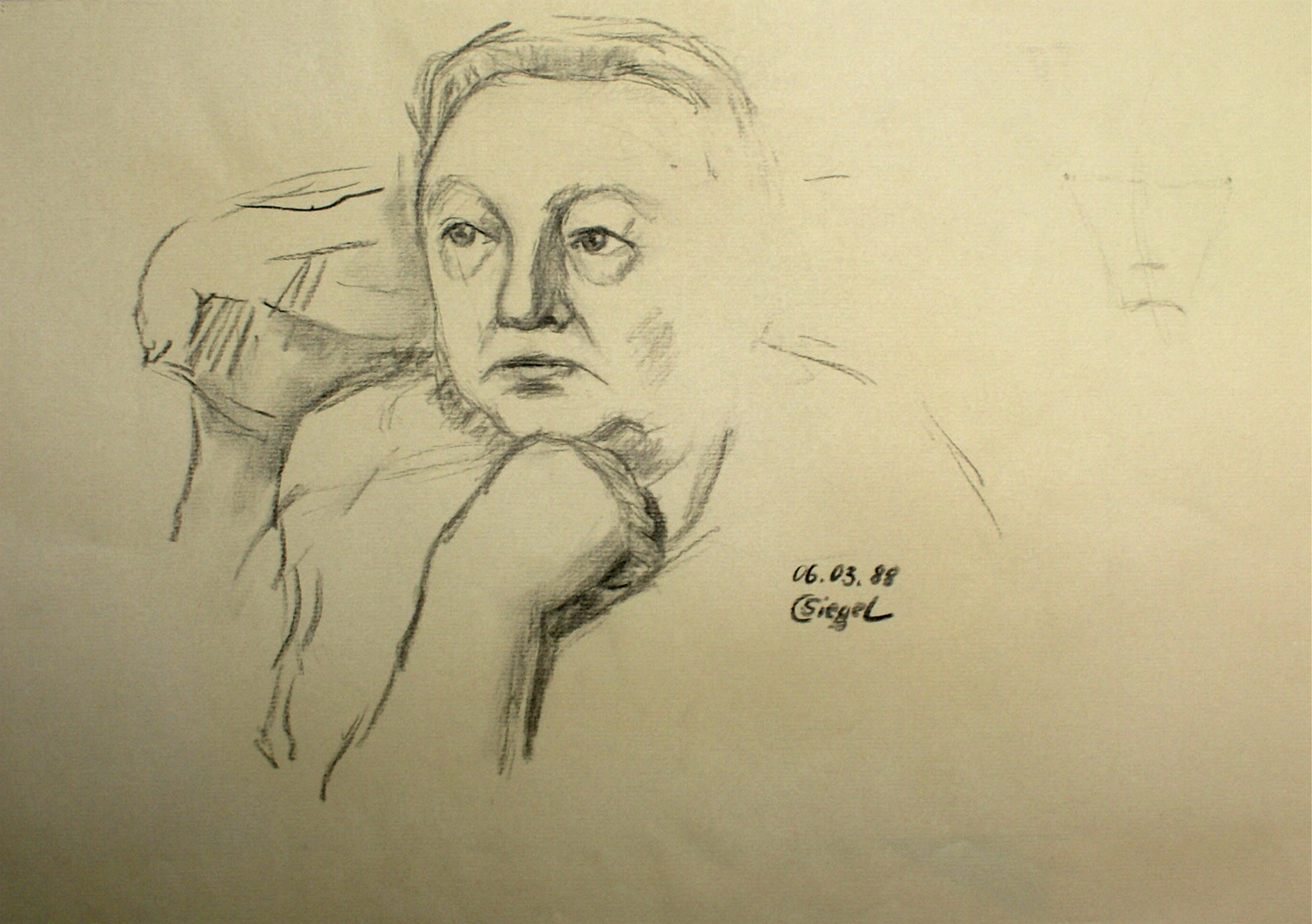 Die Malerin Tatjana Lietz gezeichnet von ihrem letzten Privatschüler Christian Siegel im Jahr 1988, Kohlezeichnung auf getöntem Ingrespapier, (Größe: ca. 45 X 55 cm)